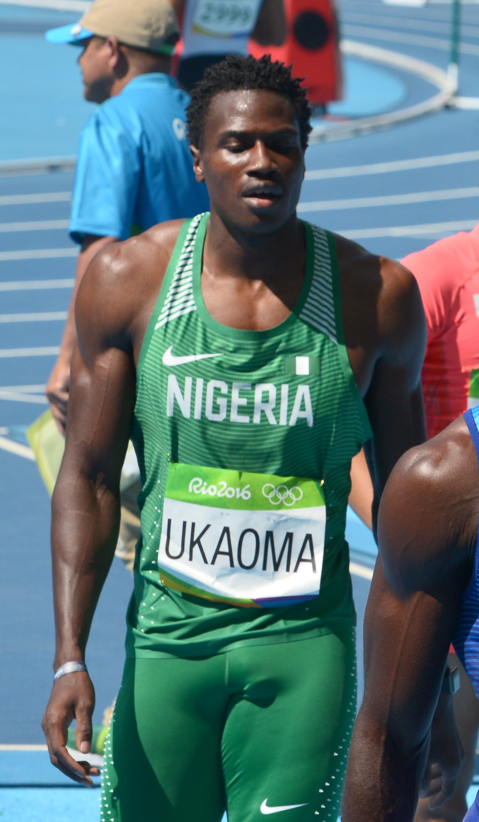 Quelques séries du 400m haies des jo de Rio 2016